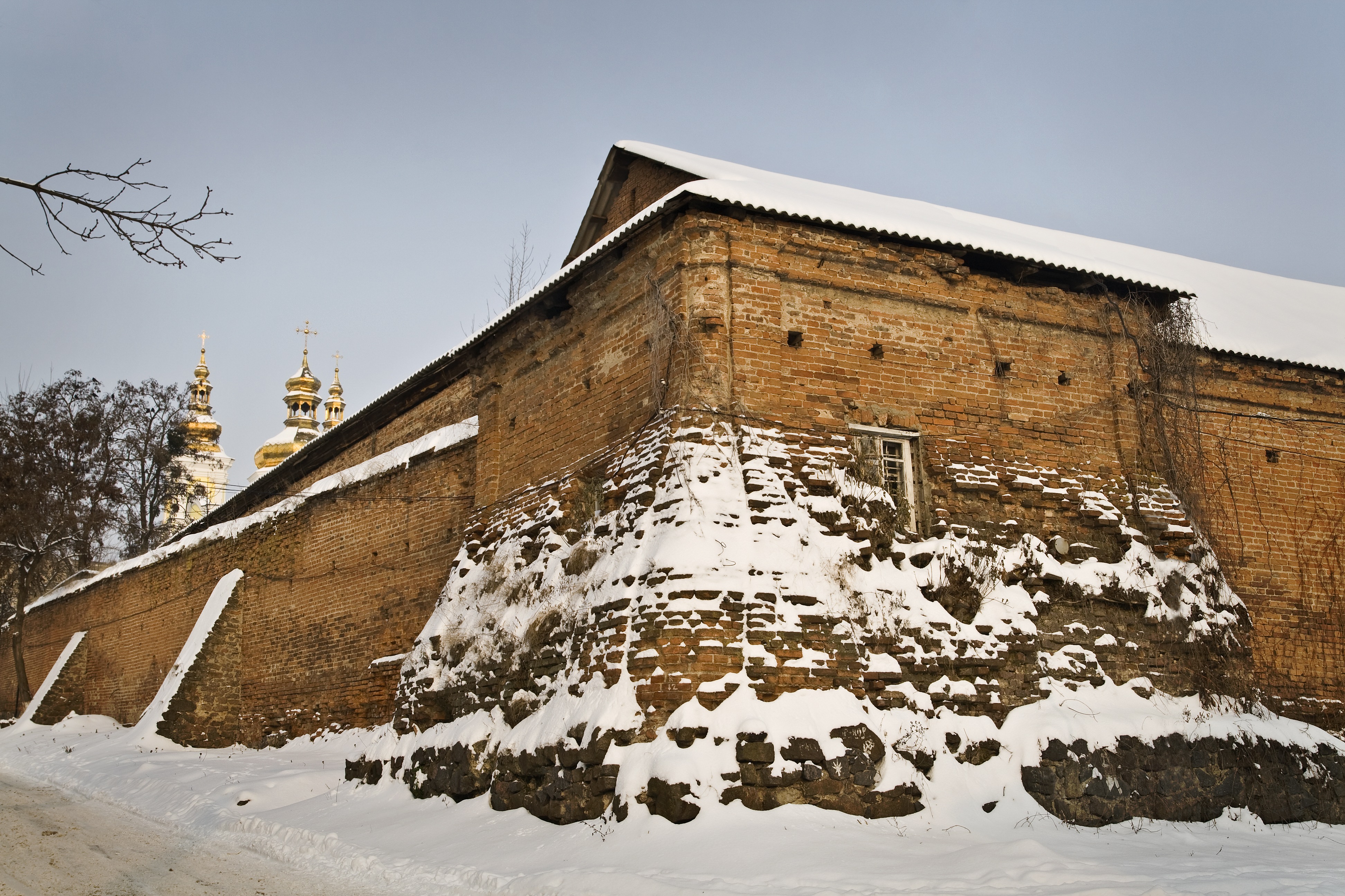 Мури. Вінниця.